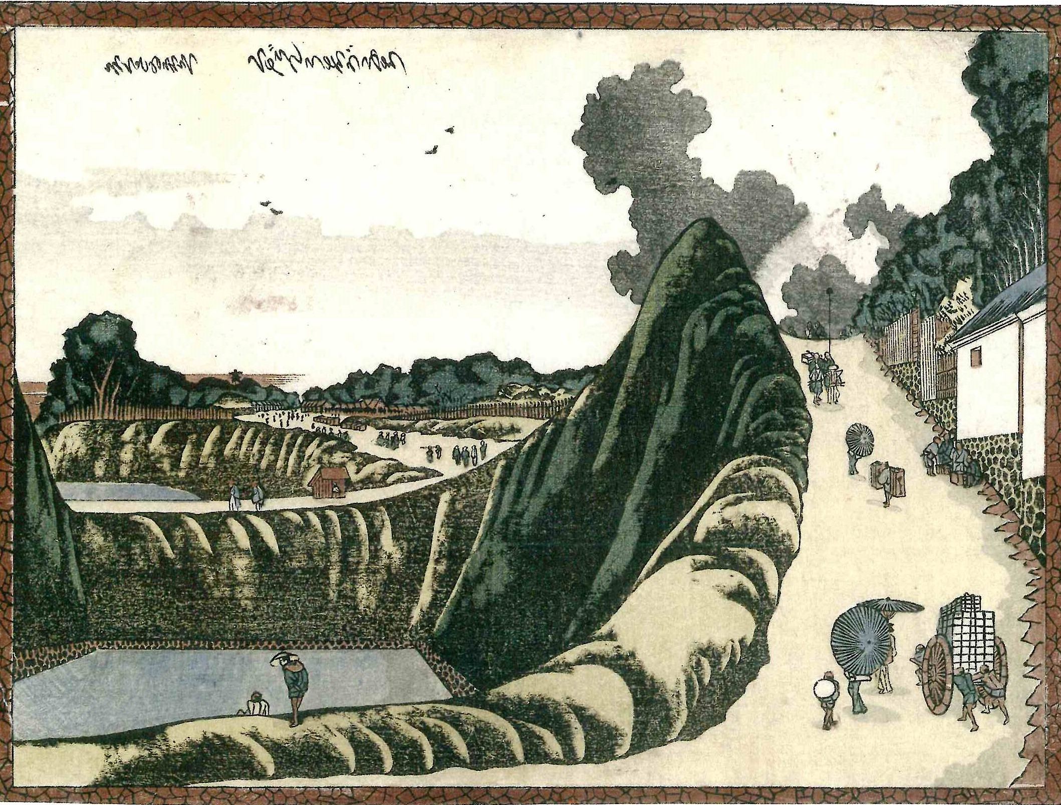 葛飾北斎の浮世絵「くだんうしがふち」